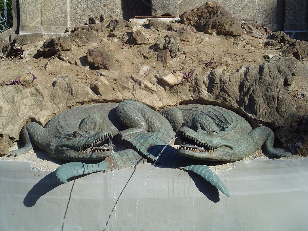 Passeio Público, Rio de Janeiro, Brazil